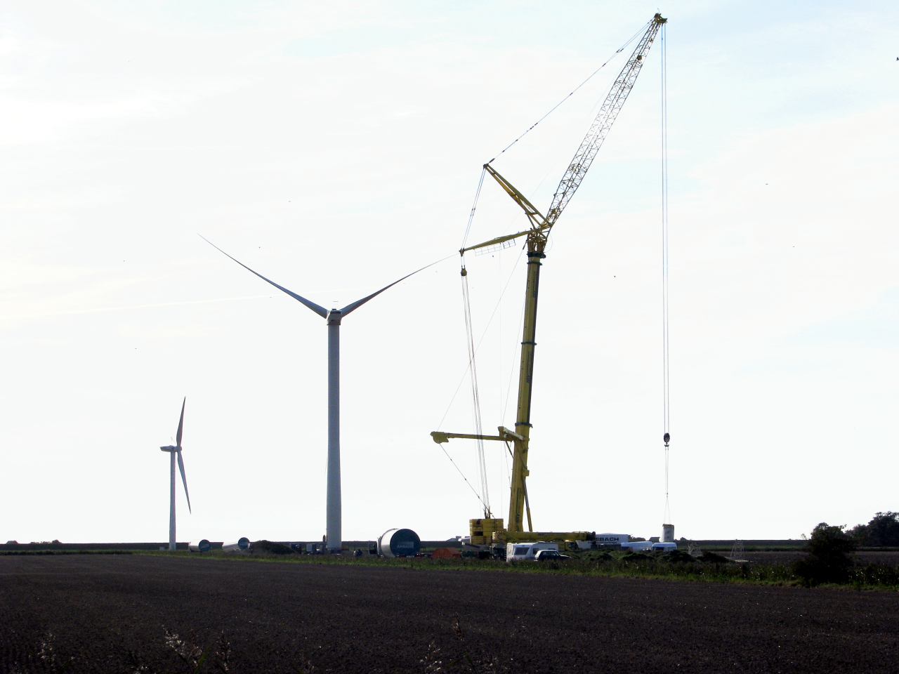 Aufbau einer Windkraftanlage für den Windpark Reußenköge V (September 2009)